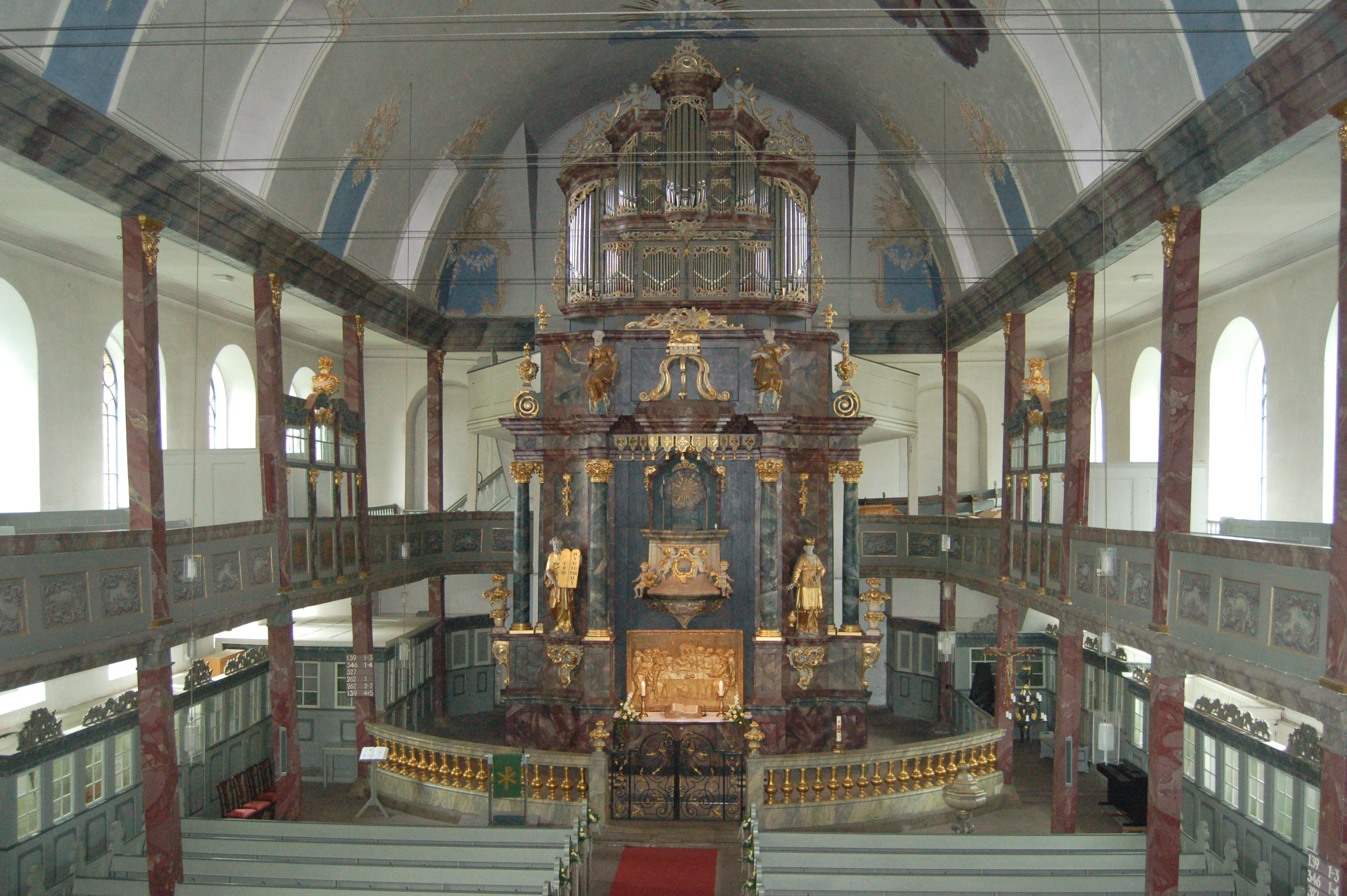 Blick auf den Kanzelaltar der Klosterkirche Uetersen von der Empore aus